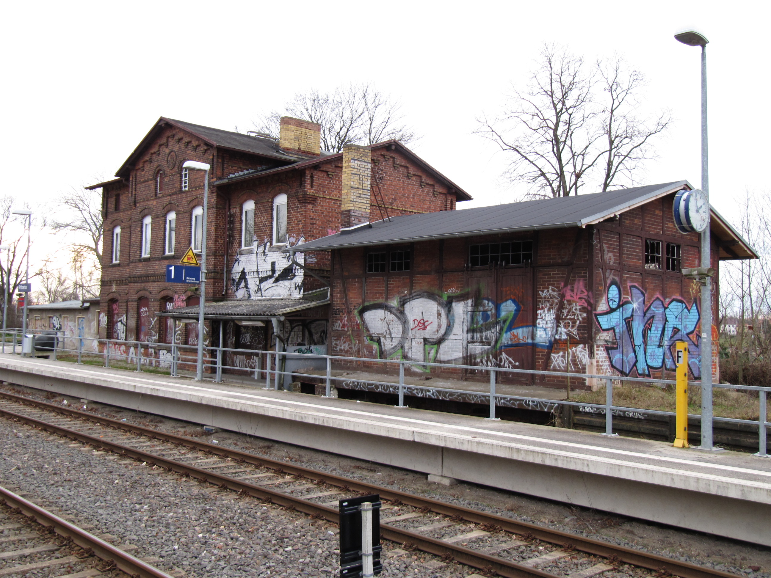 Bahnhof pritzerbe